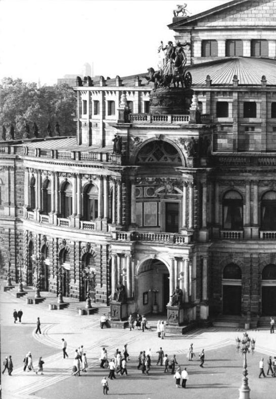 Dresden, Semperoper ADN-ZB Häßler 31.10.87 Dresden: Herbstspaziergang. Sonnig verabschiedete sich der Oktober auch im Dresdener Raum. Viele Besucher der Elbestadt nutzten dies zu einem Spaziergang durch das historische Zentrum vorbei an der Semperoper.